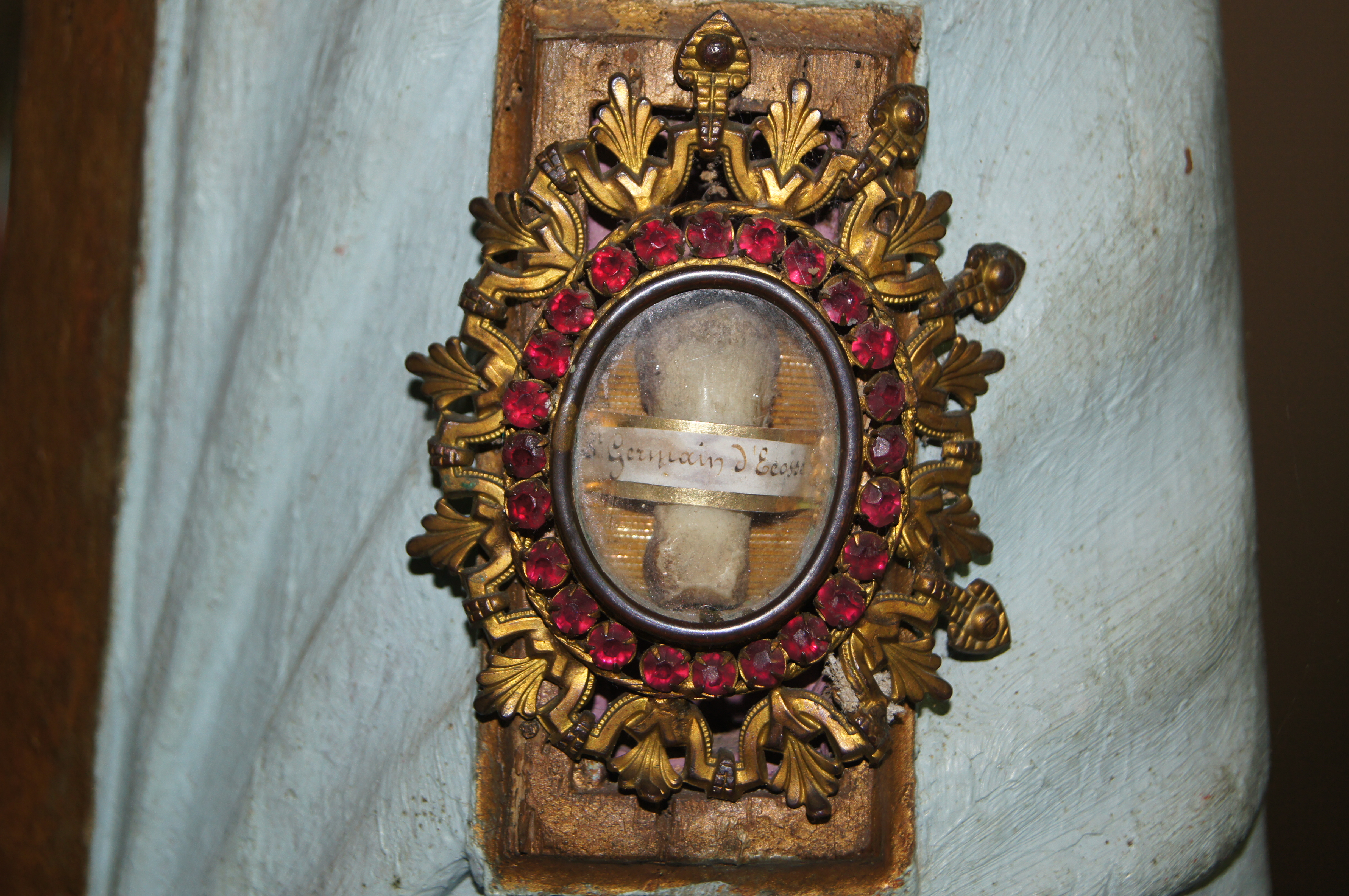 Relique Saint-Germain d'Ecosse Eglise Saint-Germain de Saint-Germain-sur-Bresle Reliquaire remontant à la fin du XVIIe siècle.